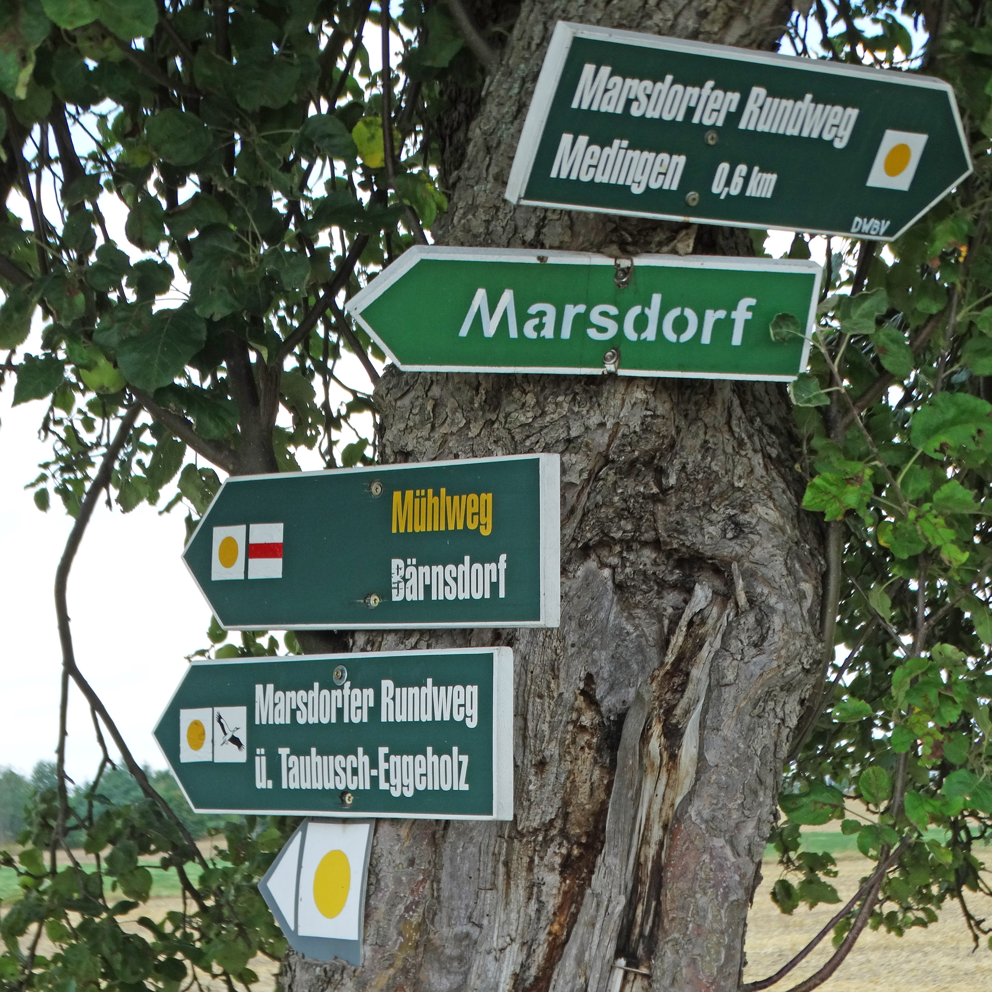 Wegweiser des Marsdorfer Rundwegs